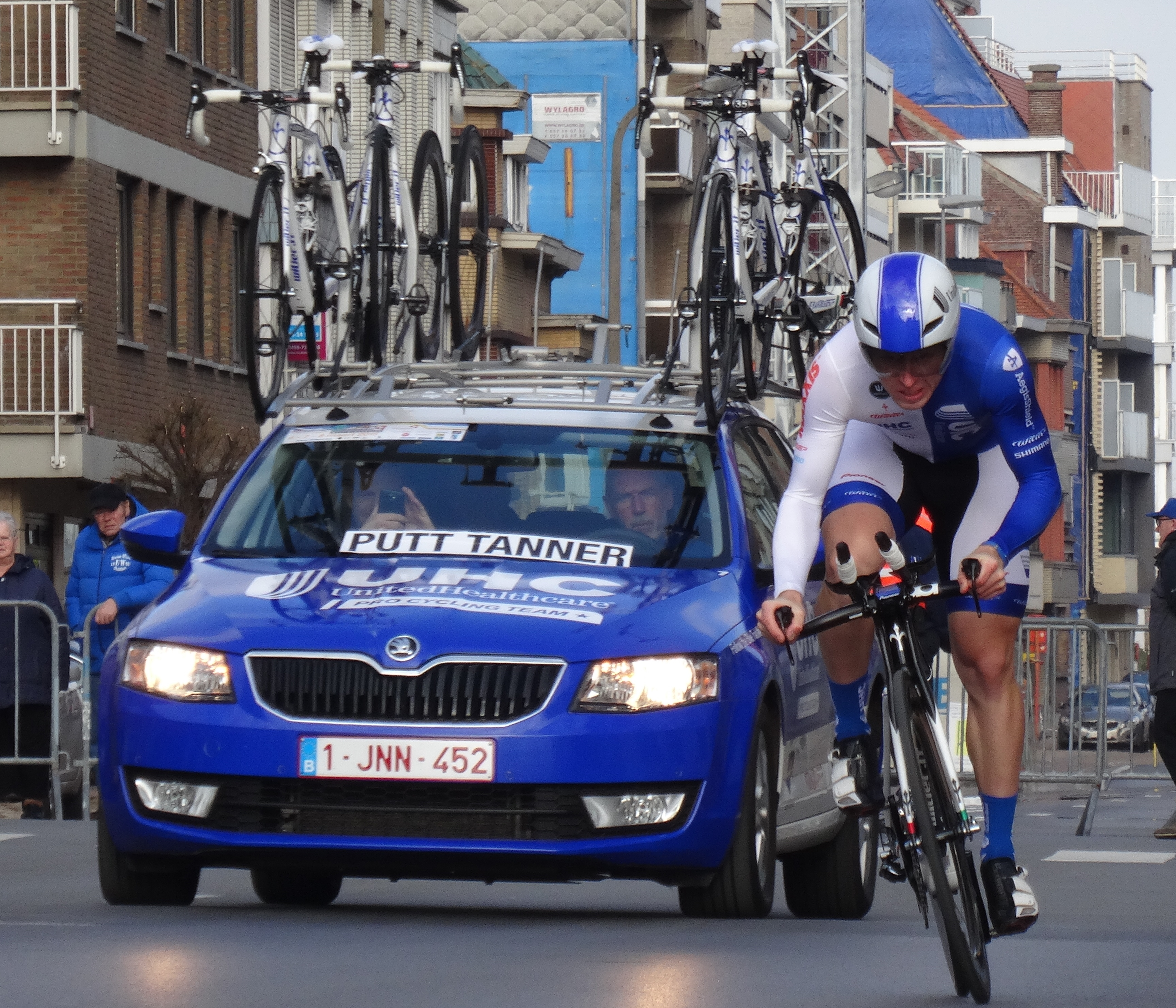 Reportage réalisé le vendredi 6 mars à l'occasion du contre-la-montre individuel du prologue des Trois jours de Flandre-Occidentale 2015 à Middelkerke, Belgique.